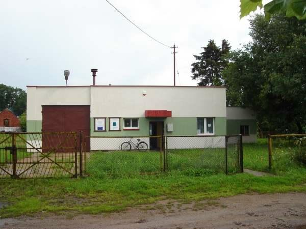 Świetlica Caritas w Redle